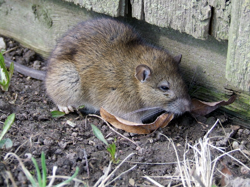 Rattus norvegicus. Dasiūnai, Kaunas district, Lithuania